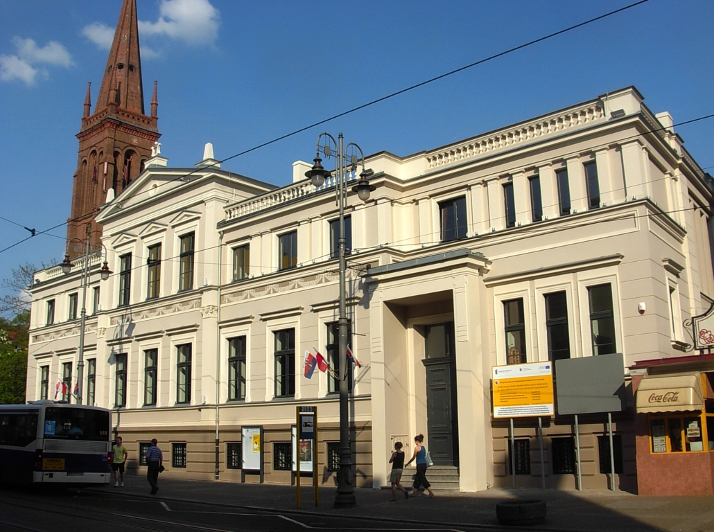 Dawne kasyno cywilne (1887), Pomorski Dom Sztuki, od 2006 r. w gestii Akademii Muzycznej w Bydgoszczy, ul. Gdańska 20